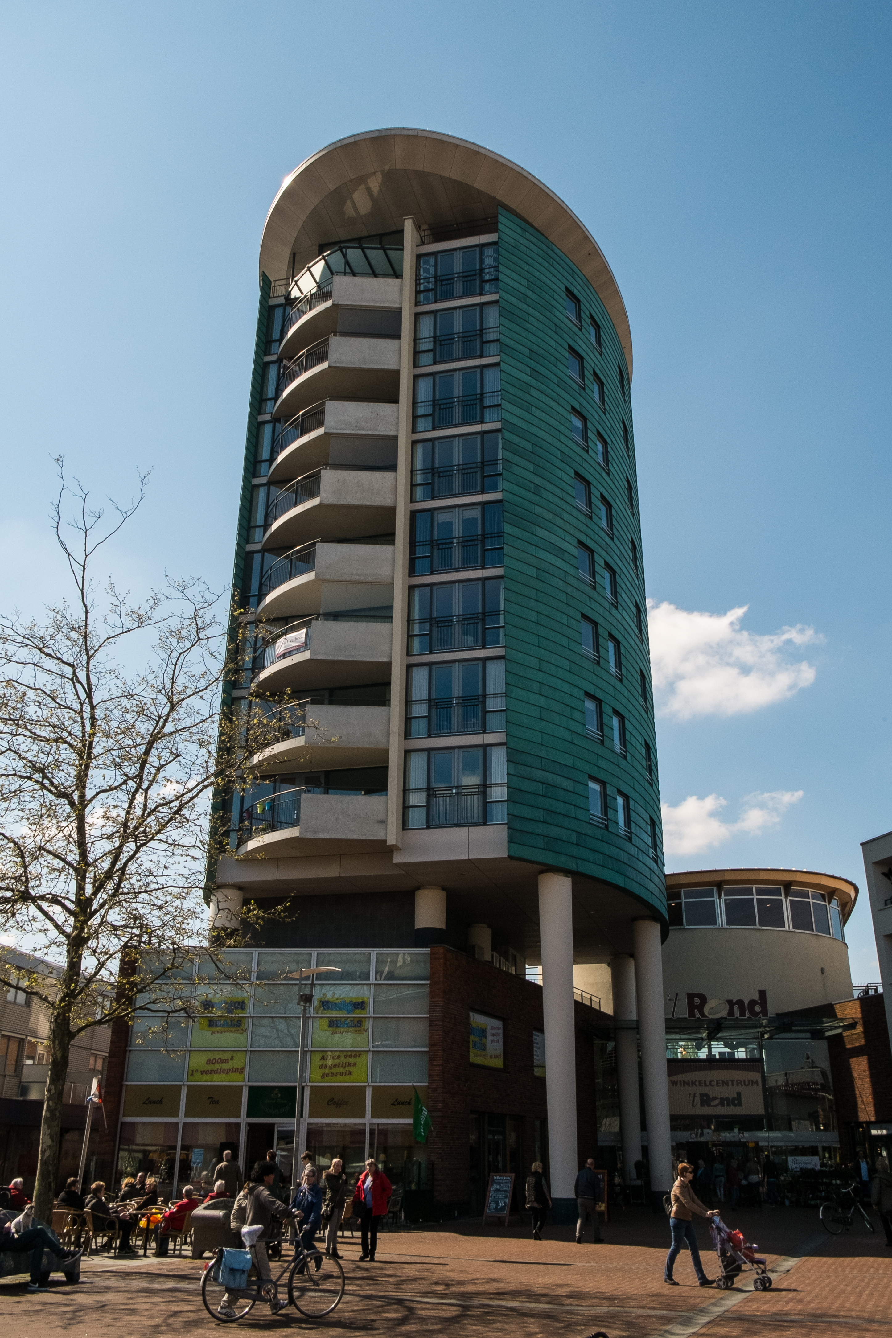 Winkelcentrum 't Rond aan het Israëlplein in Winschoten